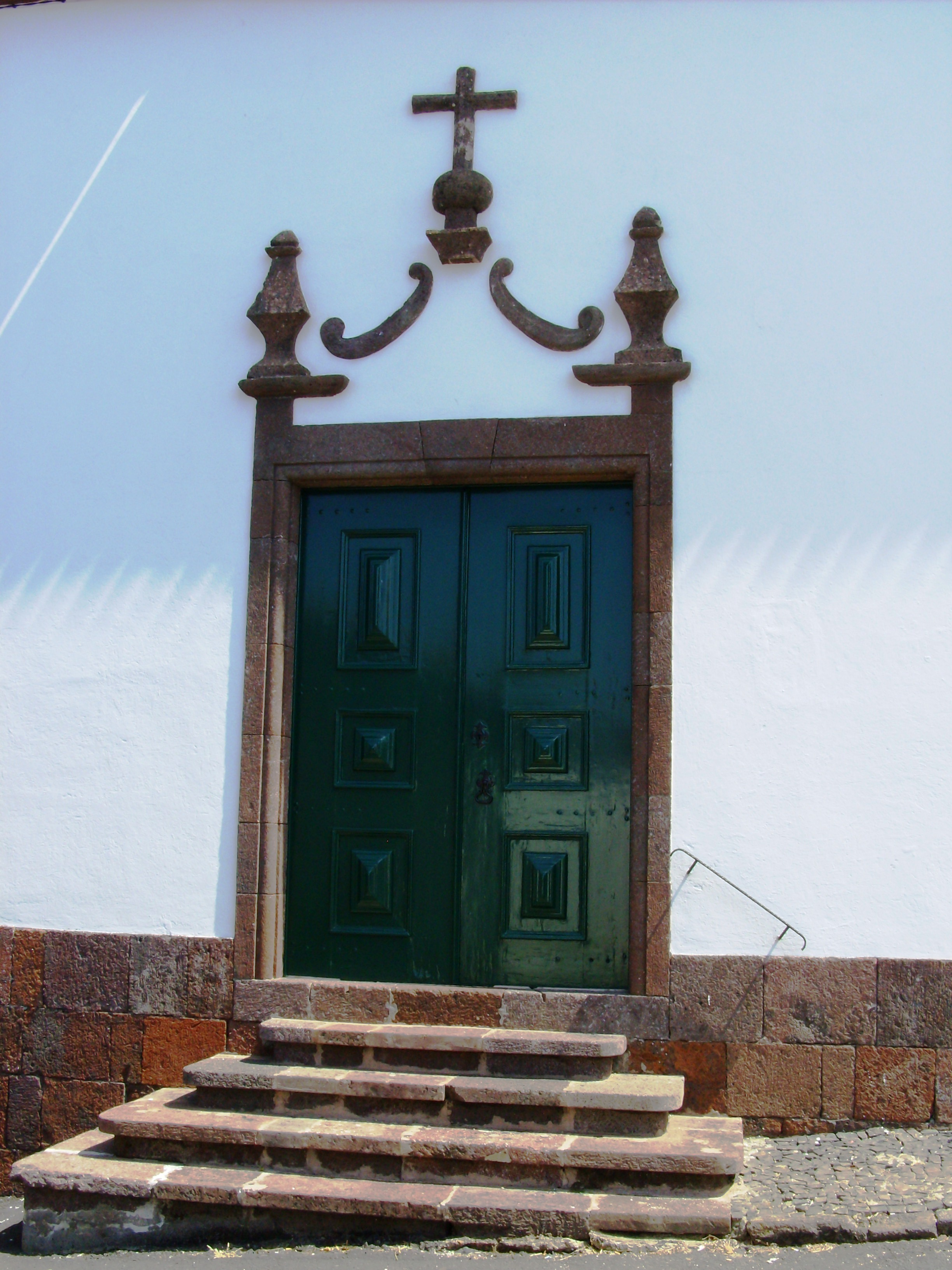 Igreja do Recohimento de Santa Maria Madalena, Vila do Porto, ilha de Santa Maria, Açores.